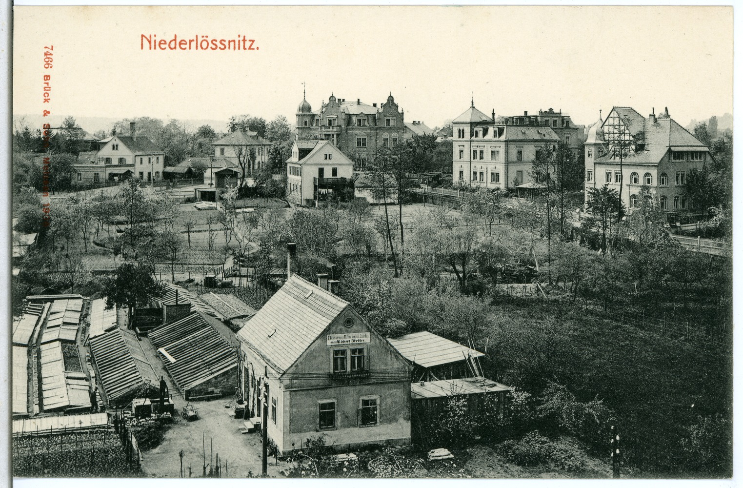 Niederlößnitz; Ortsansicht This postcard is from publisher Brück & Sohn in Meißen ( postcard has a unique number 07466 and is available in a higher resolution at the publisher. This images was uploaded in a cooperation project between Wikipedians and the publisher.